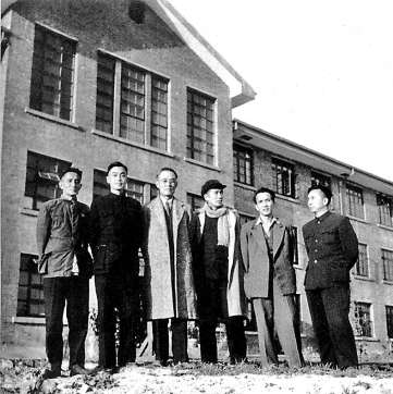 中文（香港）: 從左到右：杨荫浏、李元庆、谭抒真、贺绿汀、李凌、吕骥，1954年